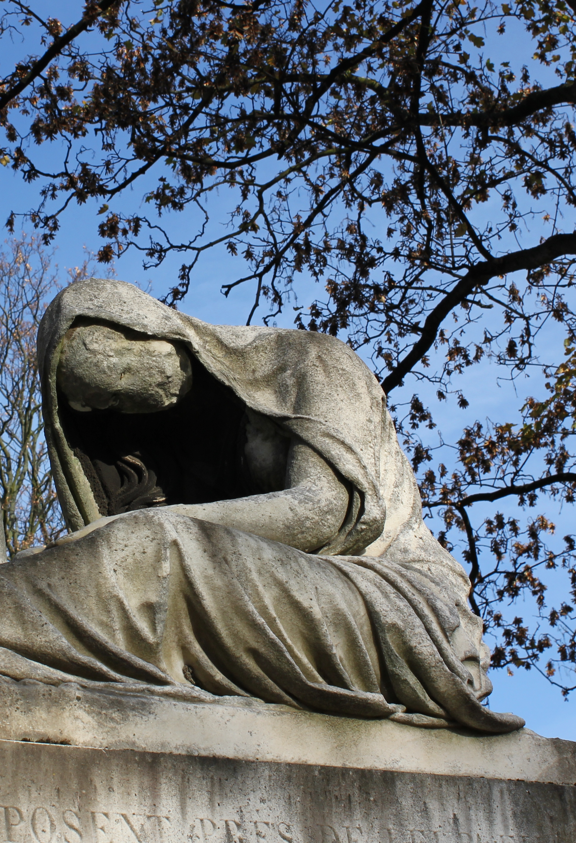 Sépulture de Joseph Desbassayns (1780-1850), ingénieur agronome réunionnais. Il est considéré comme l'un des pères de l'industrie sucrière de l'île Bourbon. Tombeau rectangulaire surmonté d'une statue en marbre d'une femme voilée, assise à terre et qui incline la tête. Une colonne surmontée d'une urne funéraire recouverte en partie d'un drap repose à côté de la femme.